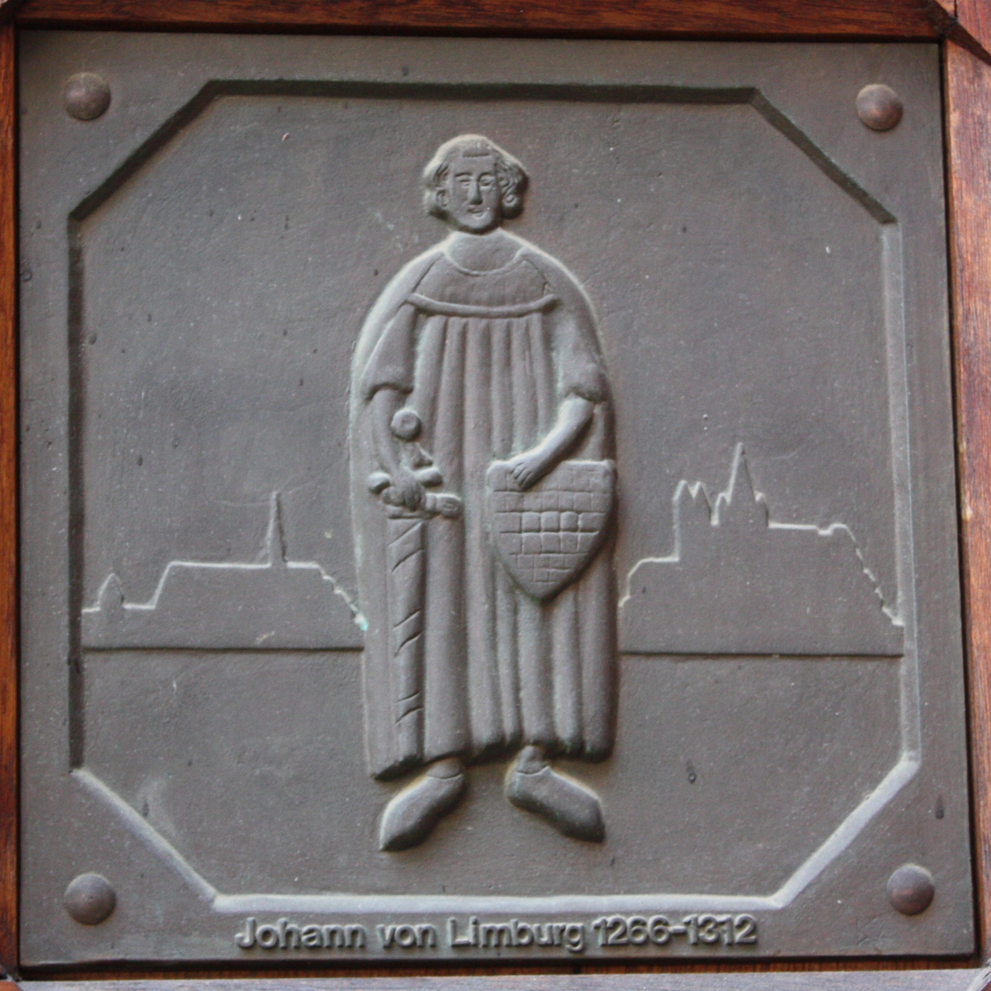 Limburg (Altstadt), Hessen: Nassauer Haus, Massivhaus des 14. Jahrhundert, Türdetail